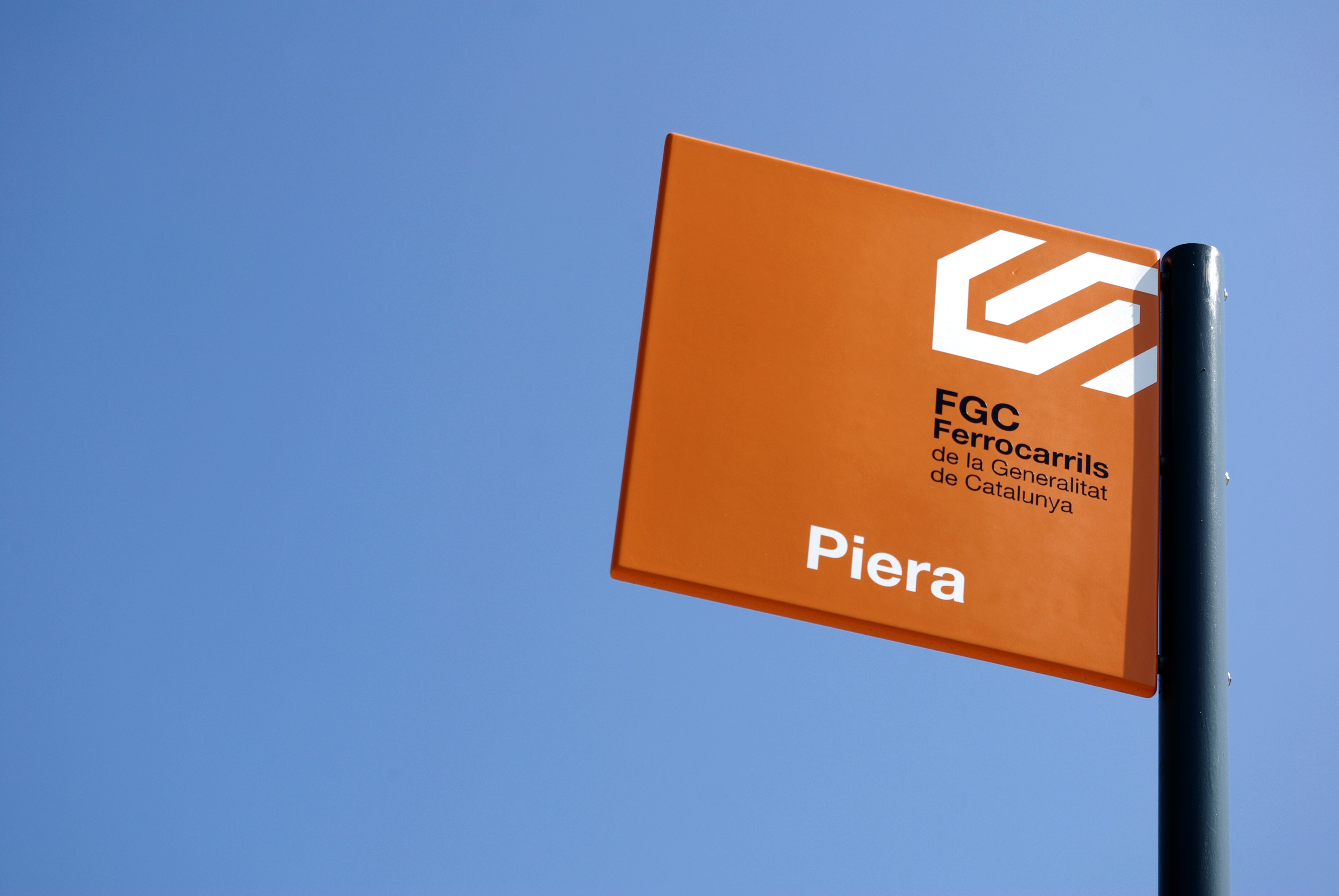 Aquelles parades obligades en un camí...